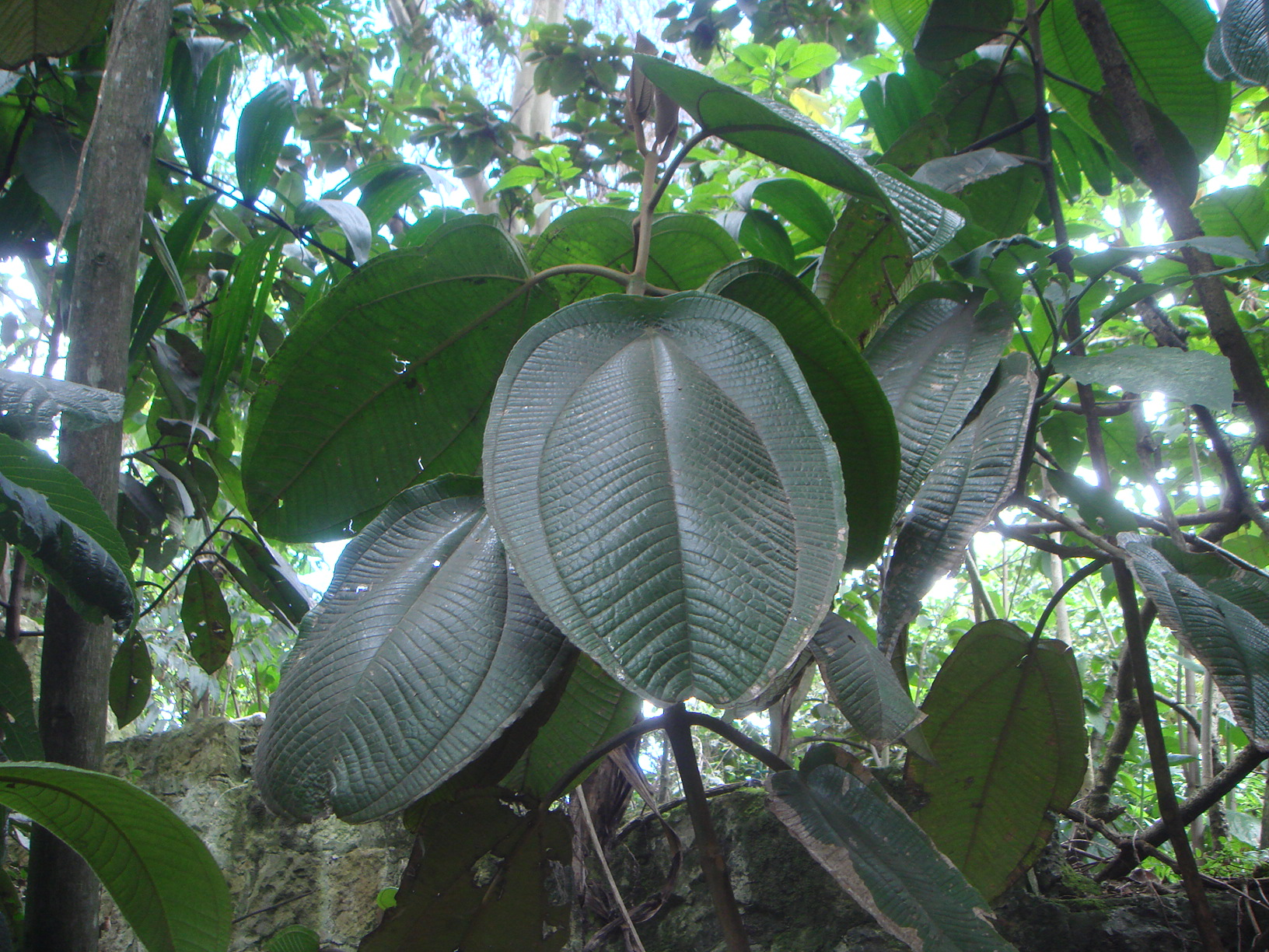 Amarraboyo (Miconia peltata), Jardín Botánico de Bogotá José Celestino Mutis, Colombia.